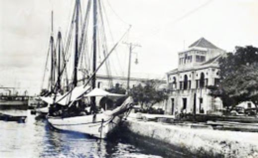 Puerto de Maracaibo, Venezuela, Estado Zulia, a finales del siglo XIX. Sede de la aduana local.